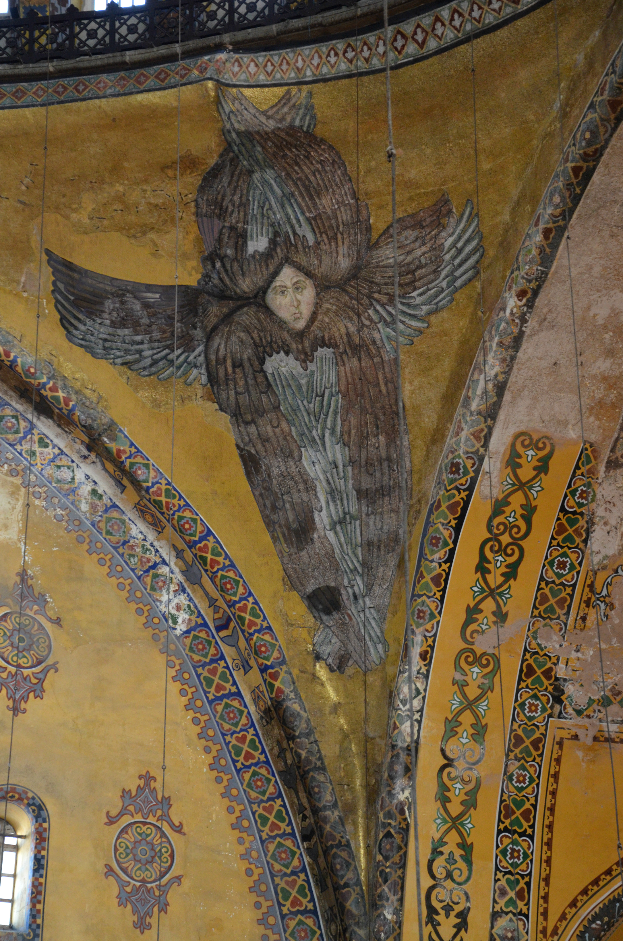 Hagia Sophia, Istanbul